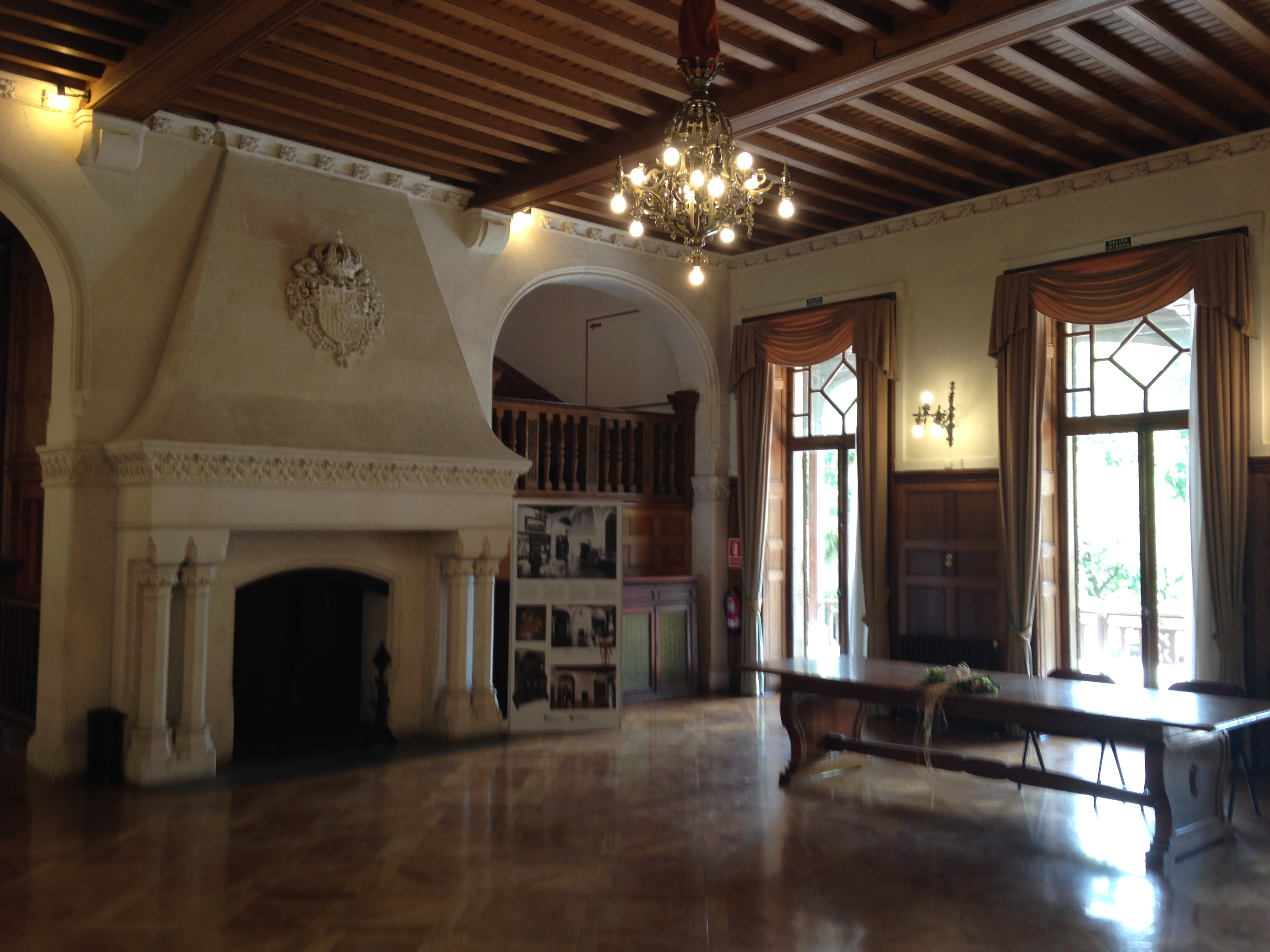 Miramar jauregiko barnealdea: Sarrera Aretoko tximinia